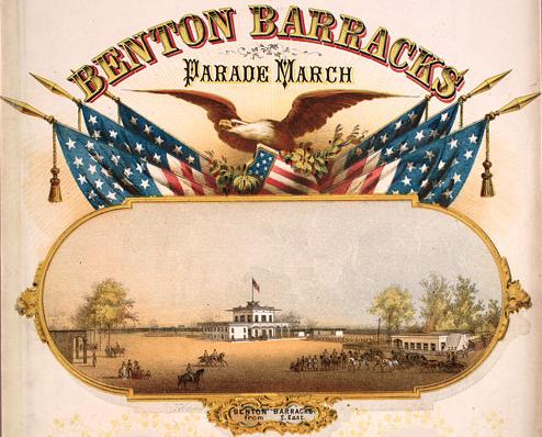 Benton Barracks, Parade March Poster, 1862